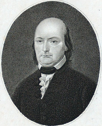 Thaddäus Anton Dereser, Kupferstich, Dozent der kurfürstlichen Akademie in Bonn. Nach einer Vorlage von Müller, Heidelberg